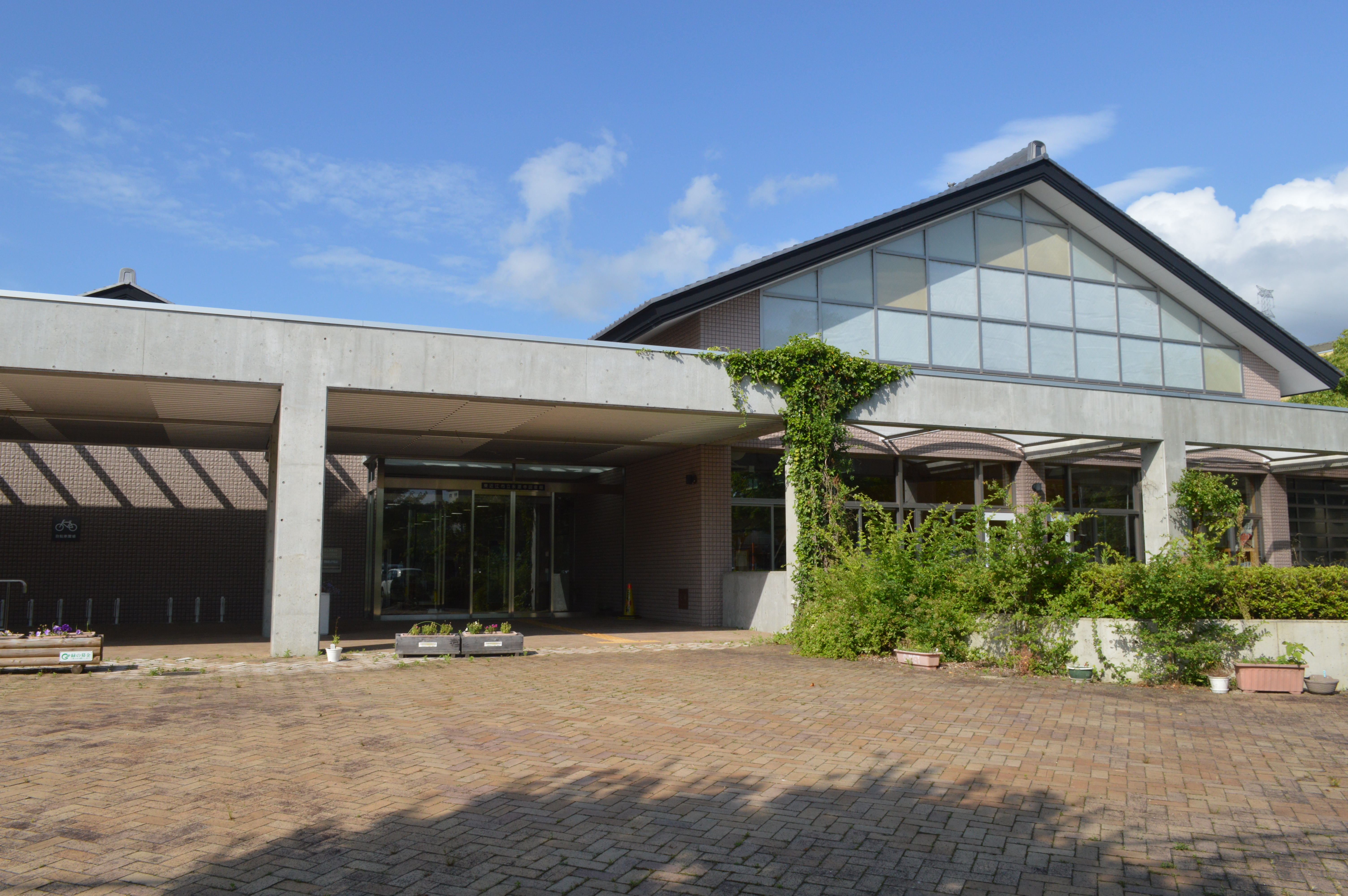 滋賀県東近江市の永源寺図書館（東近江市立図書館のひとつ）。